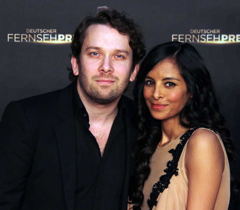 Christian Ulmen und Collien Ulmen-Fernandes beim Deutschen Fernsehpreis 2012